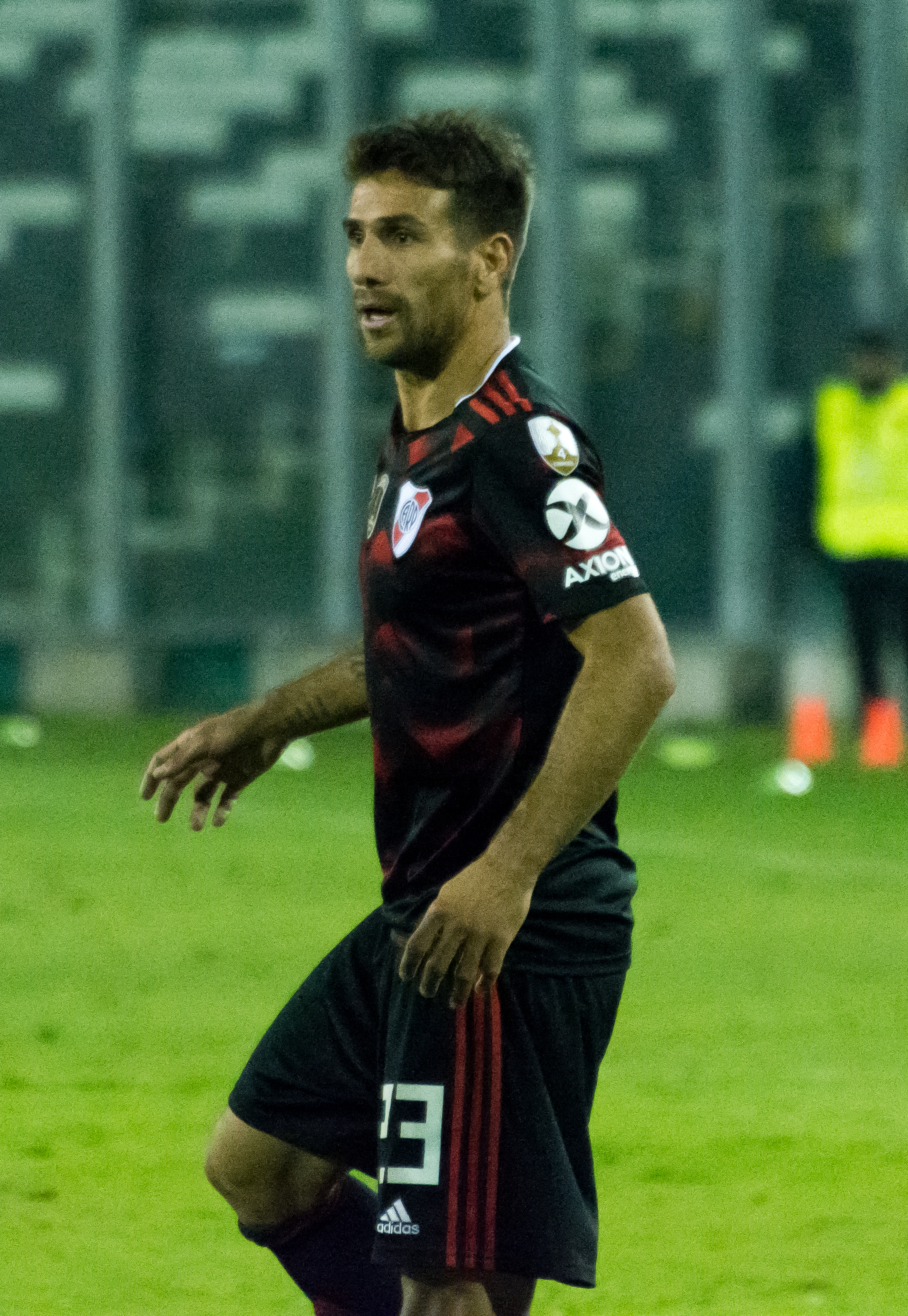 Palestino v River Plate, Estadio Monumental, Macul, Santiago, Región Metropolitana, Chile.